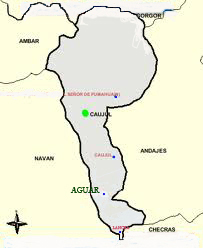 Aguar